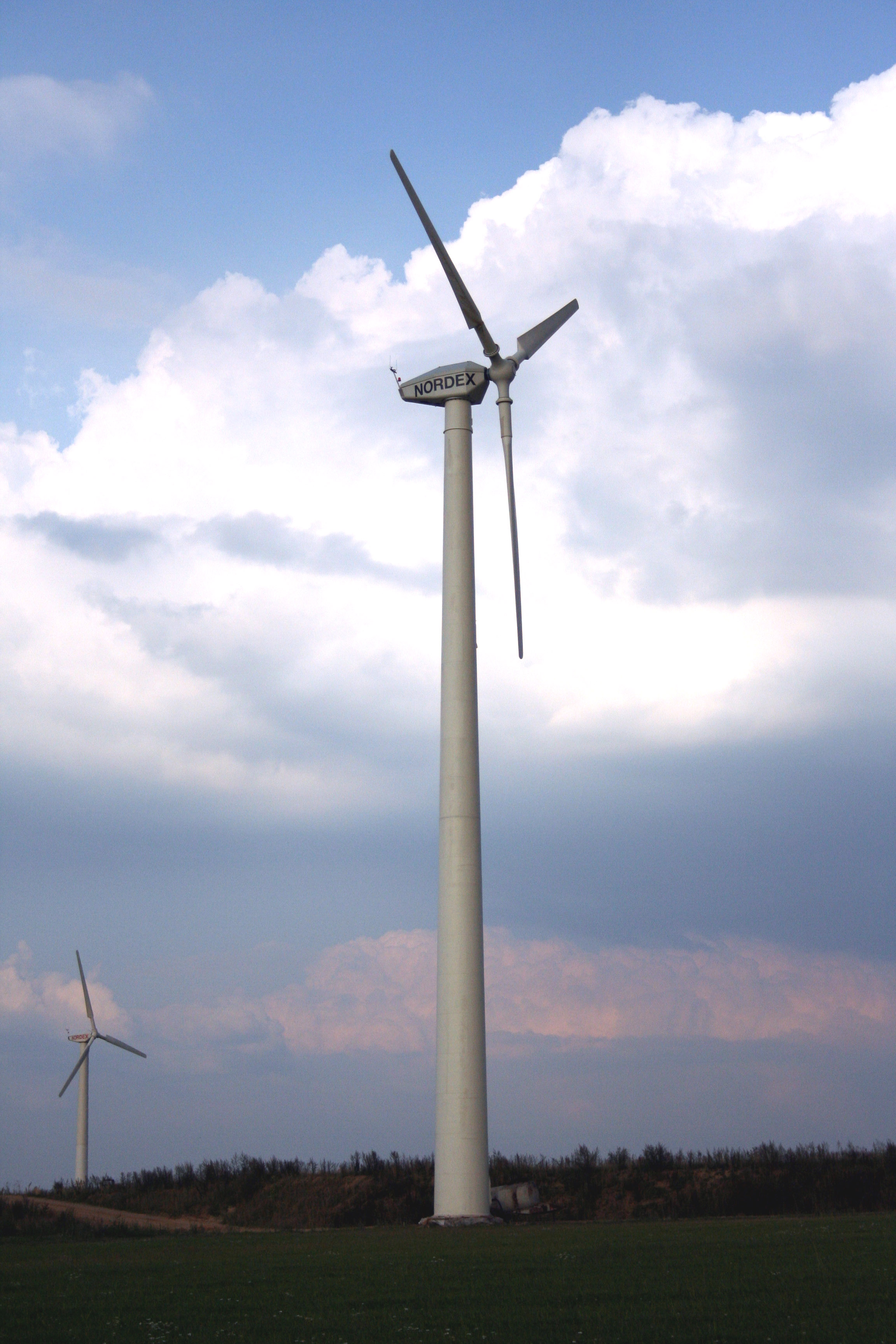 turbiny wiatrowe w Kamienicy, powiat lubliniecki